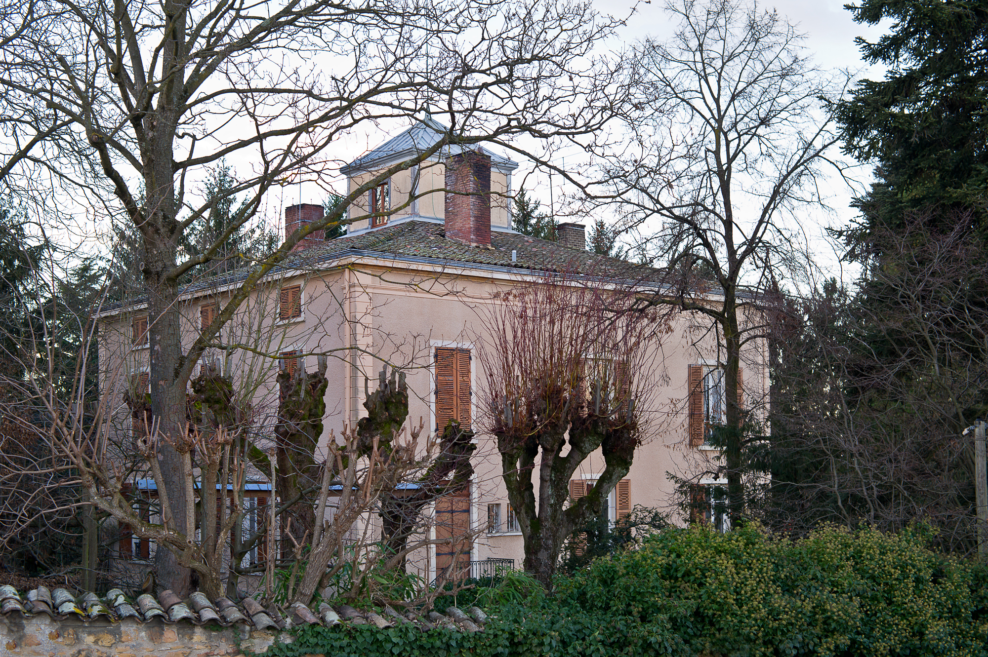 Manoir du Martelet, 11 chemin du Martelet (Inscrit, 1983) .